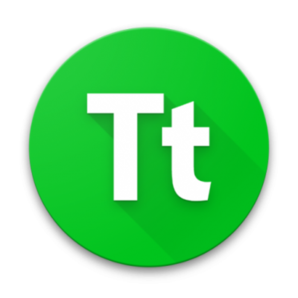 Kiswahili: Nembo ya biashara ya Tanzania Tech na Tanzania Tech Media